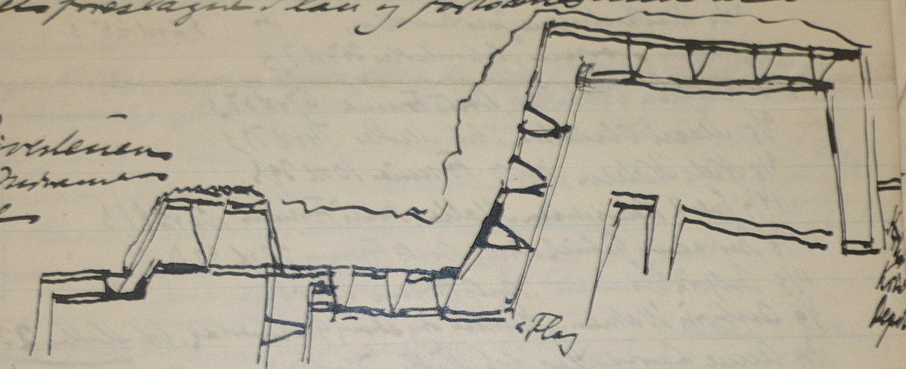 Snittegning av Skansen i Stavanger, tegnet av Axel Kielland. Originalen er i Stavanger byarkiv, privatarkiv 267 Axel Kielland. boks 4. Foto av Arne Kvitrud, 2016.